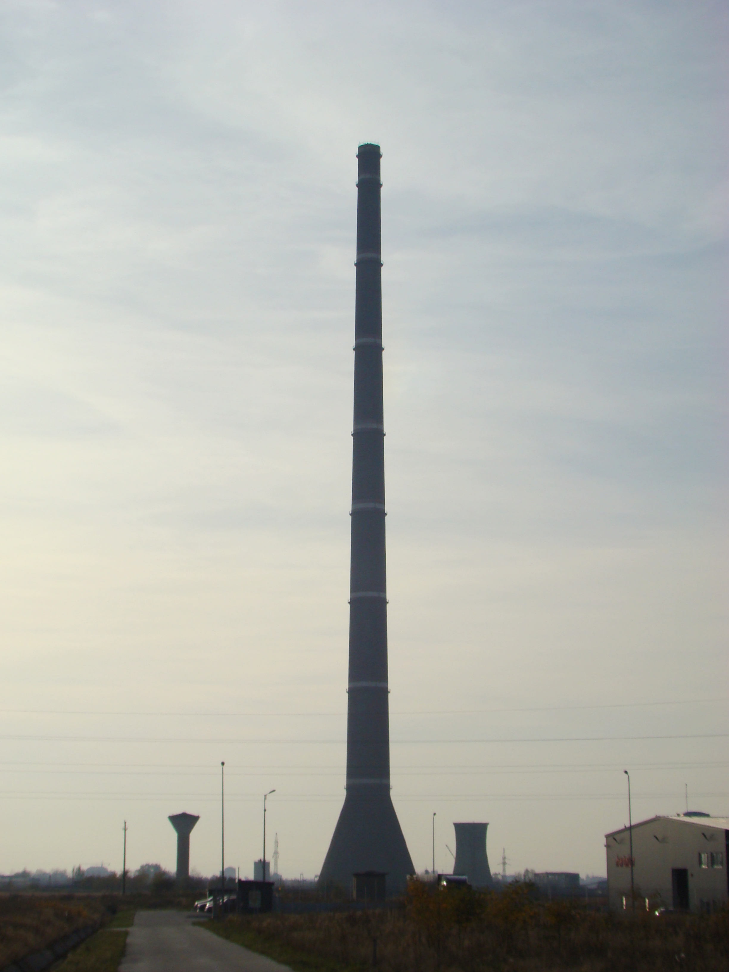 Coșul de dispersie al Combinatului metalurgic din Baja Mare